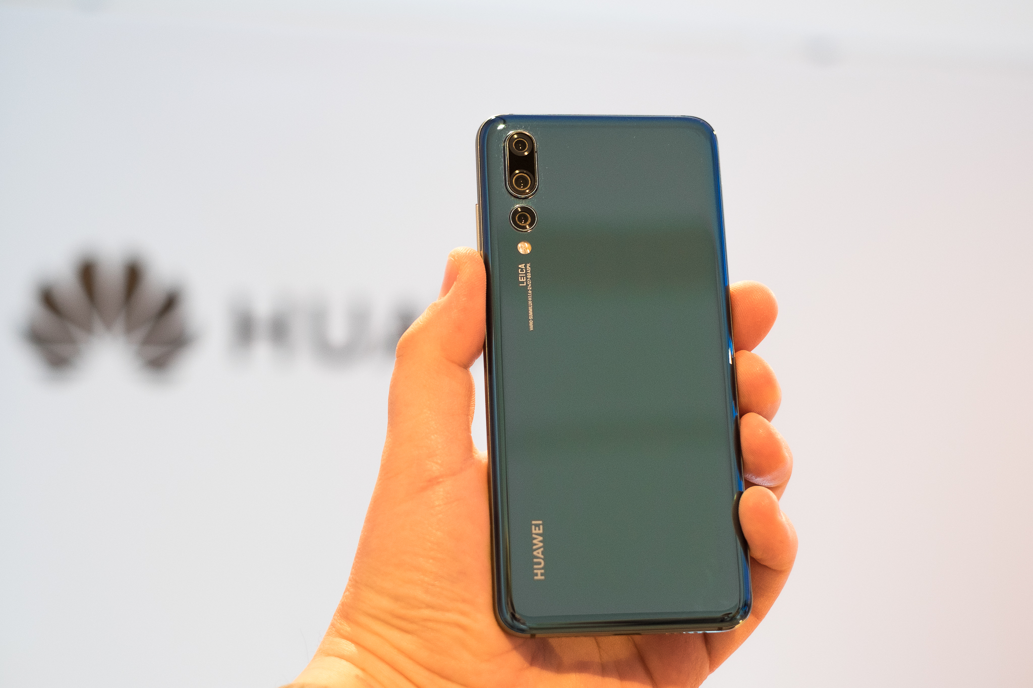 Huawei telefoni tagumine külg.